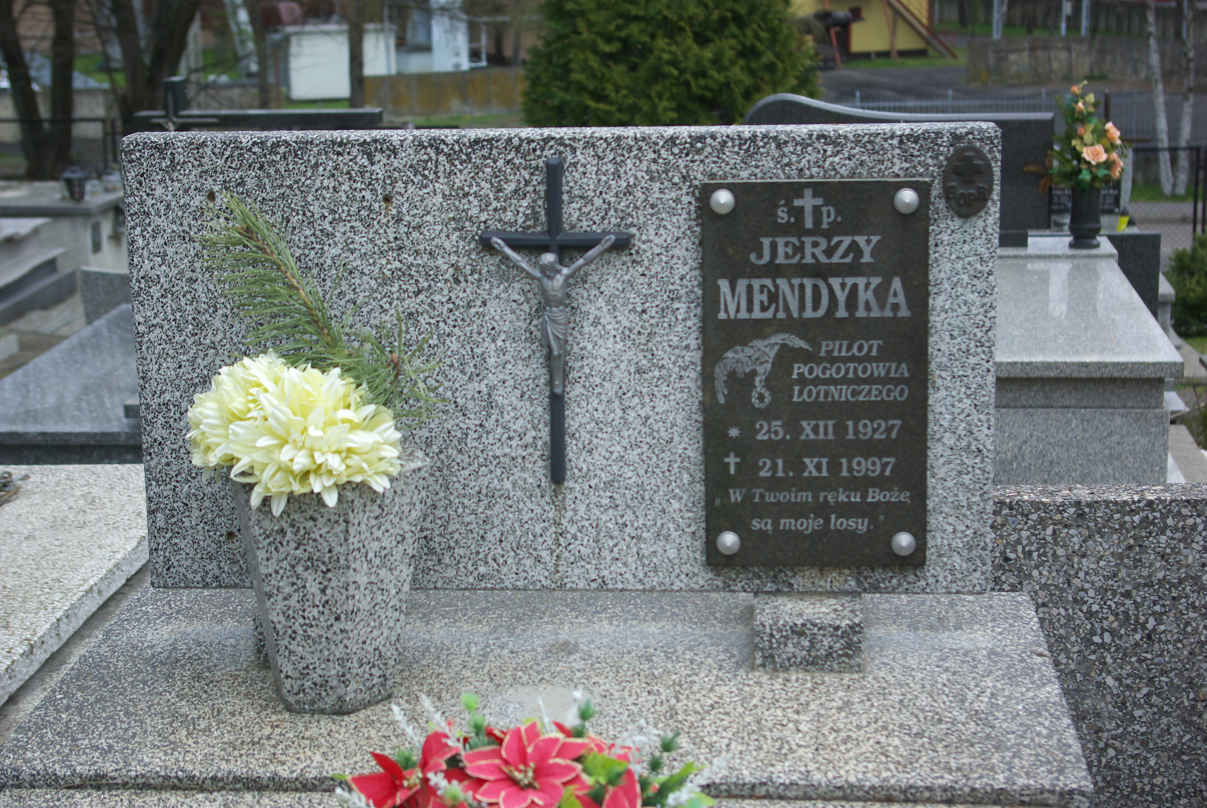 Nagrobek pilota Jerzego Mendyki na Cmentarzu Centralnym w Sanoku.